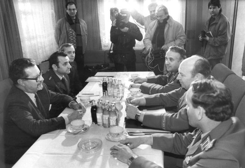 ADN-ZB-Grimm-11.11.89-Berlin: Gespräch zu Reiseregelungen-Zu einem Gespräch über Schlußfolgerungen aus den mit den neuen Reiseregelungen verbundenen Ereignissen der letzten Tage am Brandenburger Tor trafen sich am Berliner Grenzübergang "Checkpoint Charly" Oberst Günter Leo, stellvertretender Kommandeur des Grenzkommandos Mitte (2.v.r.), und der Polizeipräsident von Berlin (West), Georg Scherz (l.). Dabei ging es um einen schnelleren Austausch polizeitechnischer Informationen und bessere Kontaktmöglichkeiten zwischen beiden Seiten."